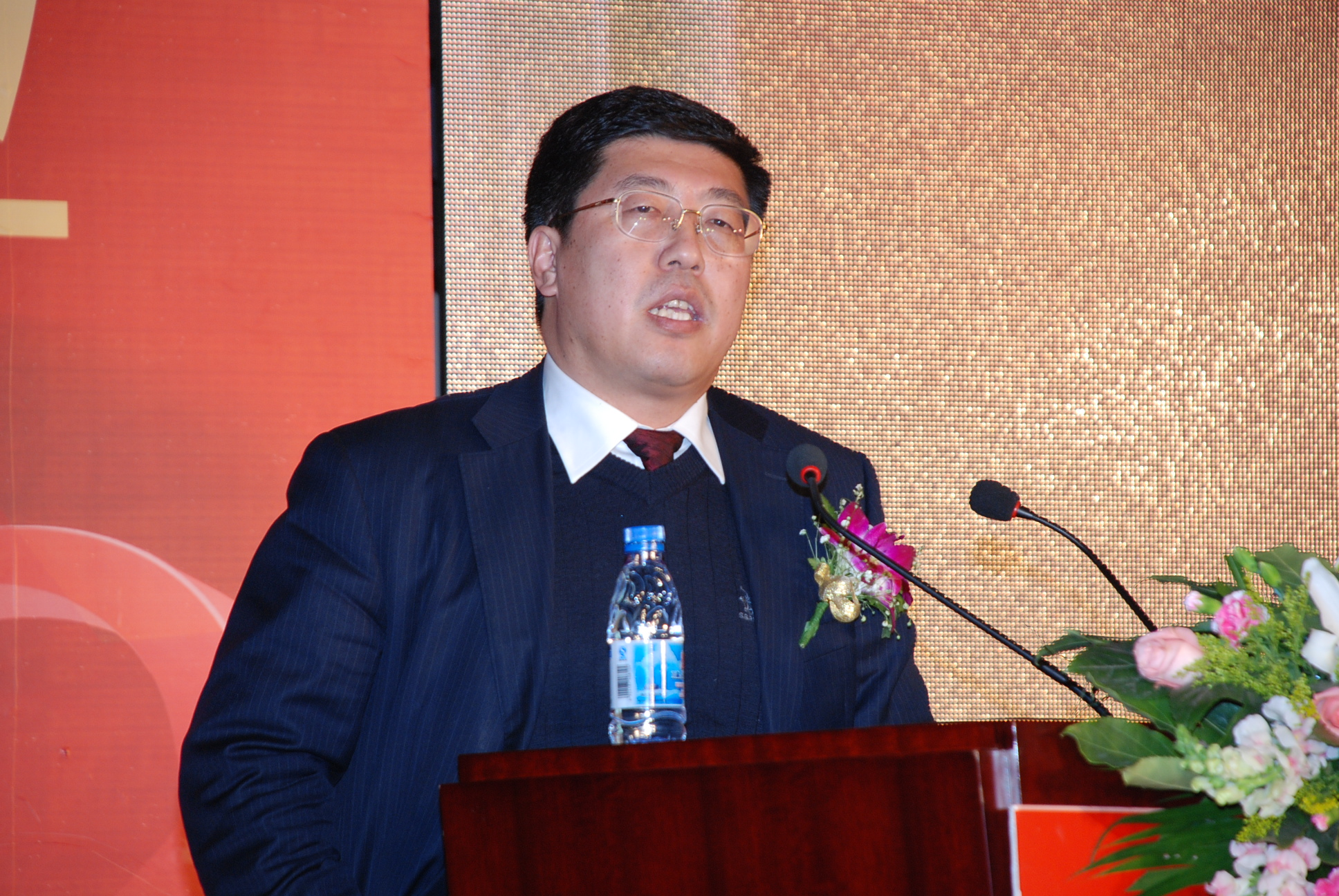 董藩参加沈阳万达广场项目作主题演讲。